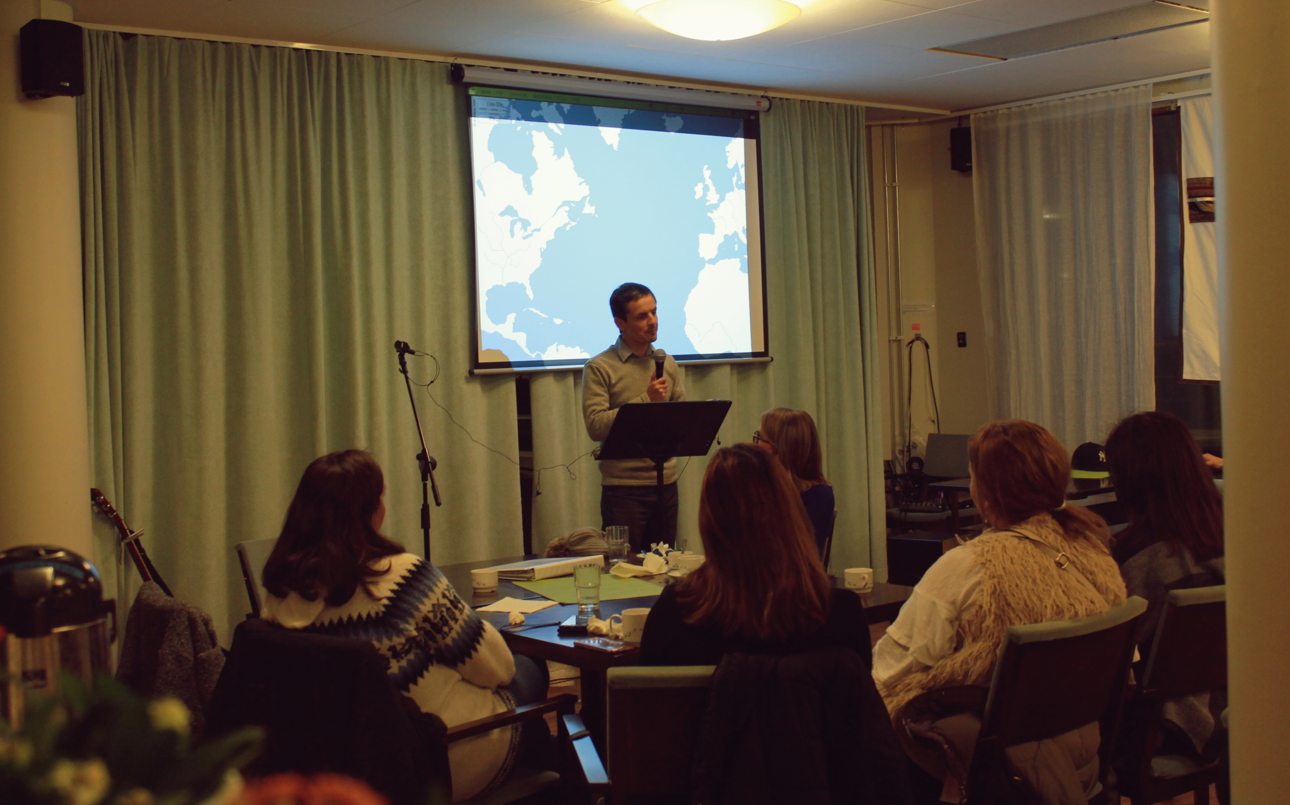 Gudstjänst